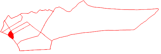 Ubicación de la parroquia La Rosa en el municipio Cabimas, estado Zulia, Venezuela